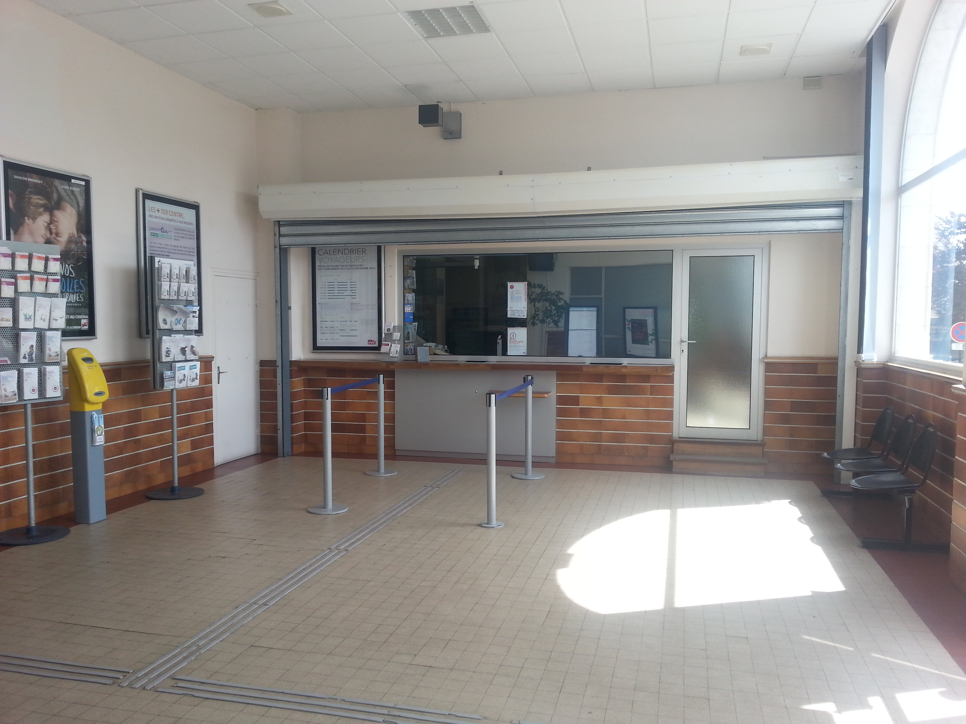 Gare d'Argenton-sur-Creuse (36) : Le guichet du bâtiment voyageurs.